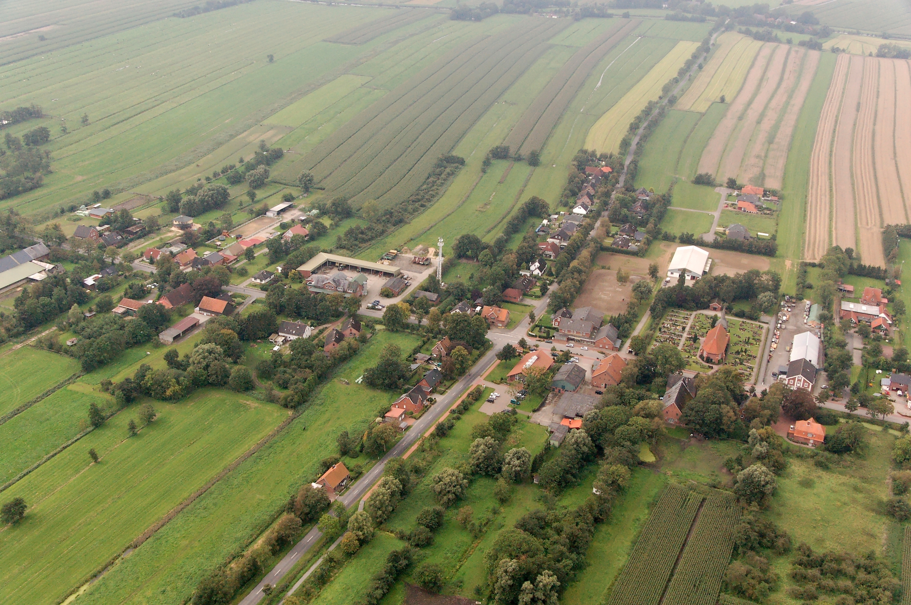 Bülkau Dorf mit Kirche, Reitplatz / halle, Schützenplatz und Gemeindehalle Dieses Foto entstand aufgrund eines Projektes, das von Wikimedia Deutschland e. V. gefördert wurde. Im Rahmen des „Community-Projektbudgets“ sollen Luftbilder u.a. von Inseln, Halligen, Sanden und Küstenstädten der deutschen Nordseeküste angefertigt werden. Das Projekt „Fotoflüge“ wurde im September 2011 begonnen.